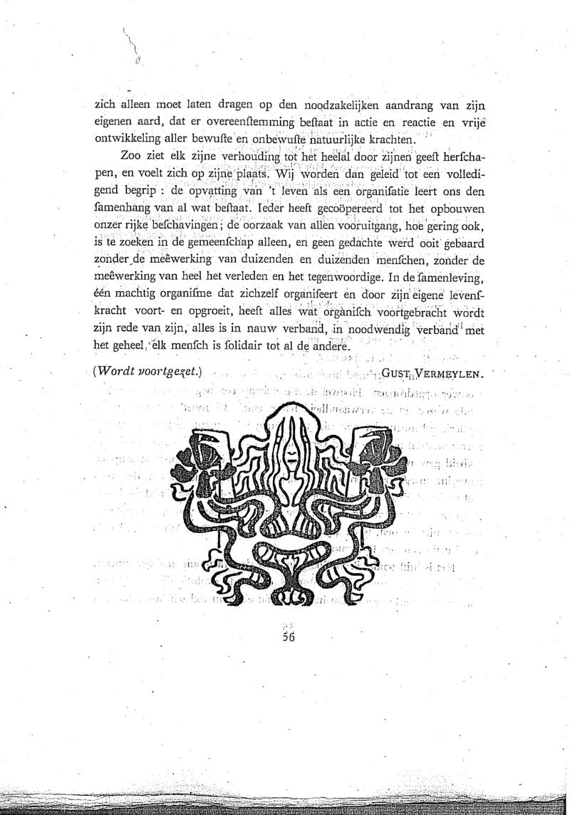 La page 56 de la revue flamande d'expression néerlandaise "Van Nu en Straks" (numéro 6-7 de l'année 1893). Manifeste "De Kunst in de vrije Gemeenschap" (L'Art dans la société libre), de l'auteur August Vermeylen.